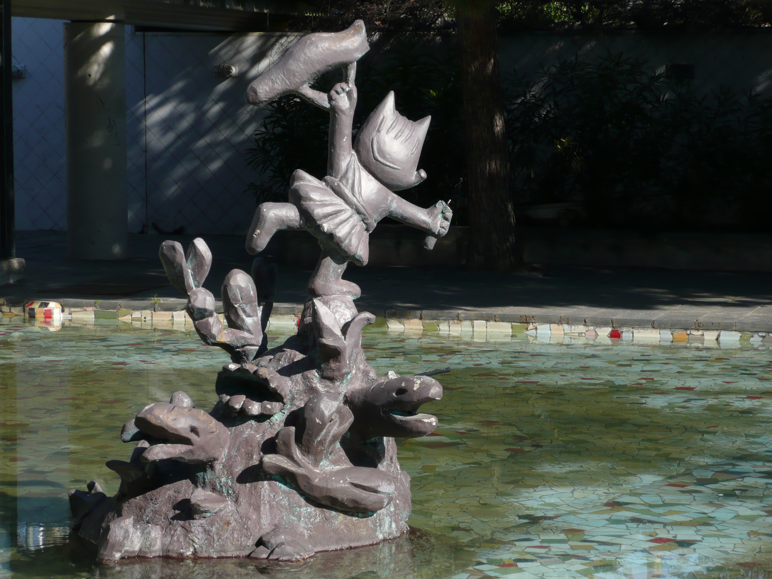 Estany de Cobi (Xavier Mariscal). Parc dels Ponts (Barcelona)